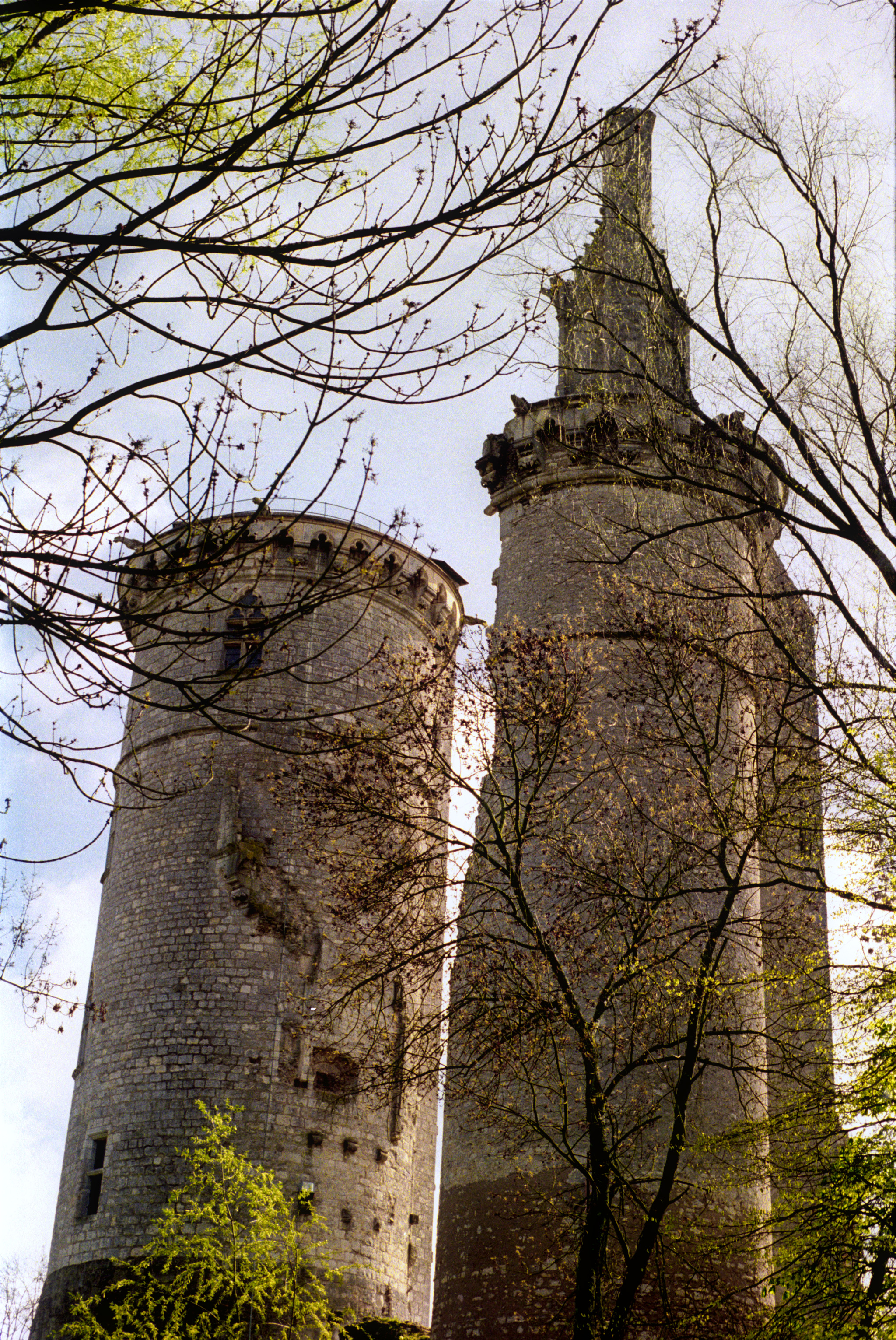 Ruines du Château Charles VII à Mehun-sur-Yèvre, Cher